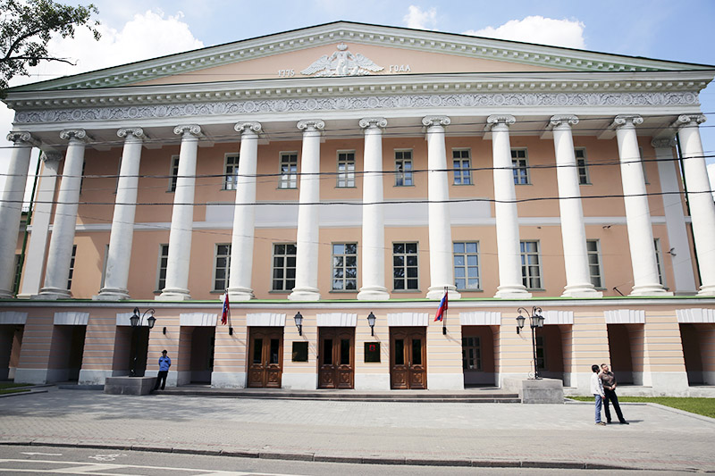 Страстной бульвар, д. 15/29, стр. 1